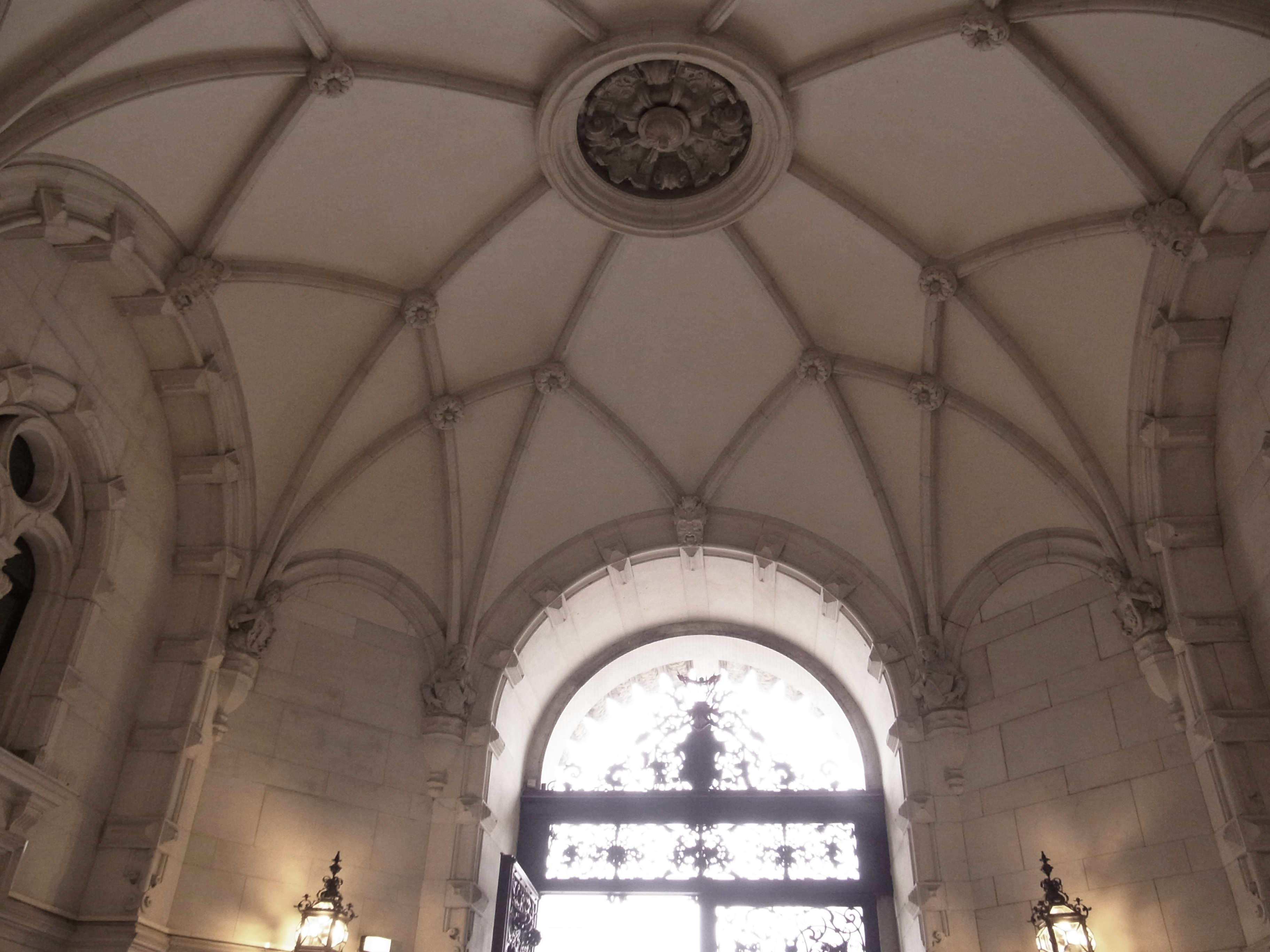 An den Sockeln der Gewölberippen wurden Brustbilder von Lehrlingen des Bauhandwerks gesetzt. Bildhauer war Karl Börner (1828-1905)